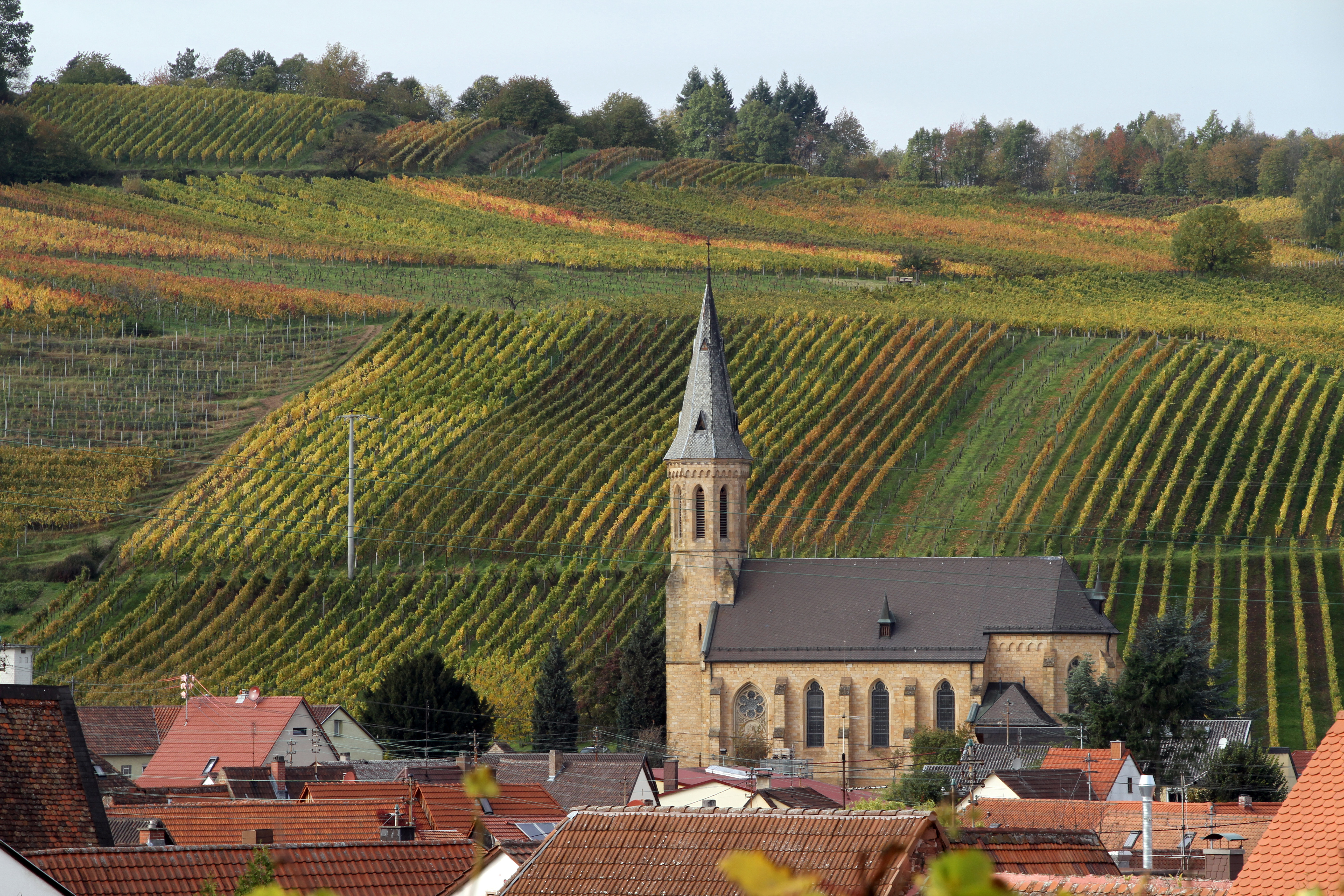 Birkweiler, Am Daschberg 1; katholische Kirche St. Bartholomäus; neugotischer Saalbau, Sandsteinquader, 1896.